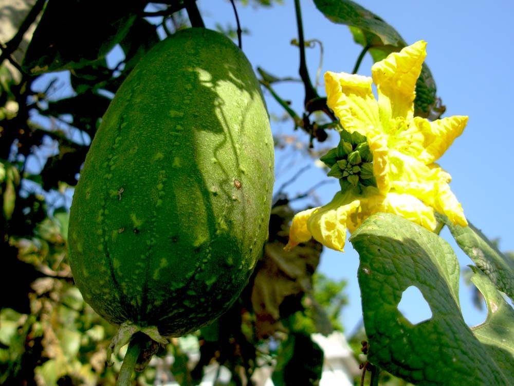 ഒരു തരം പീച്ചിൽ